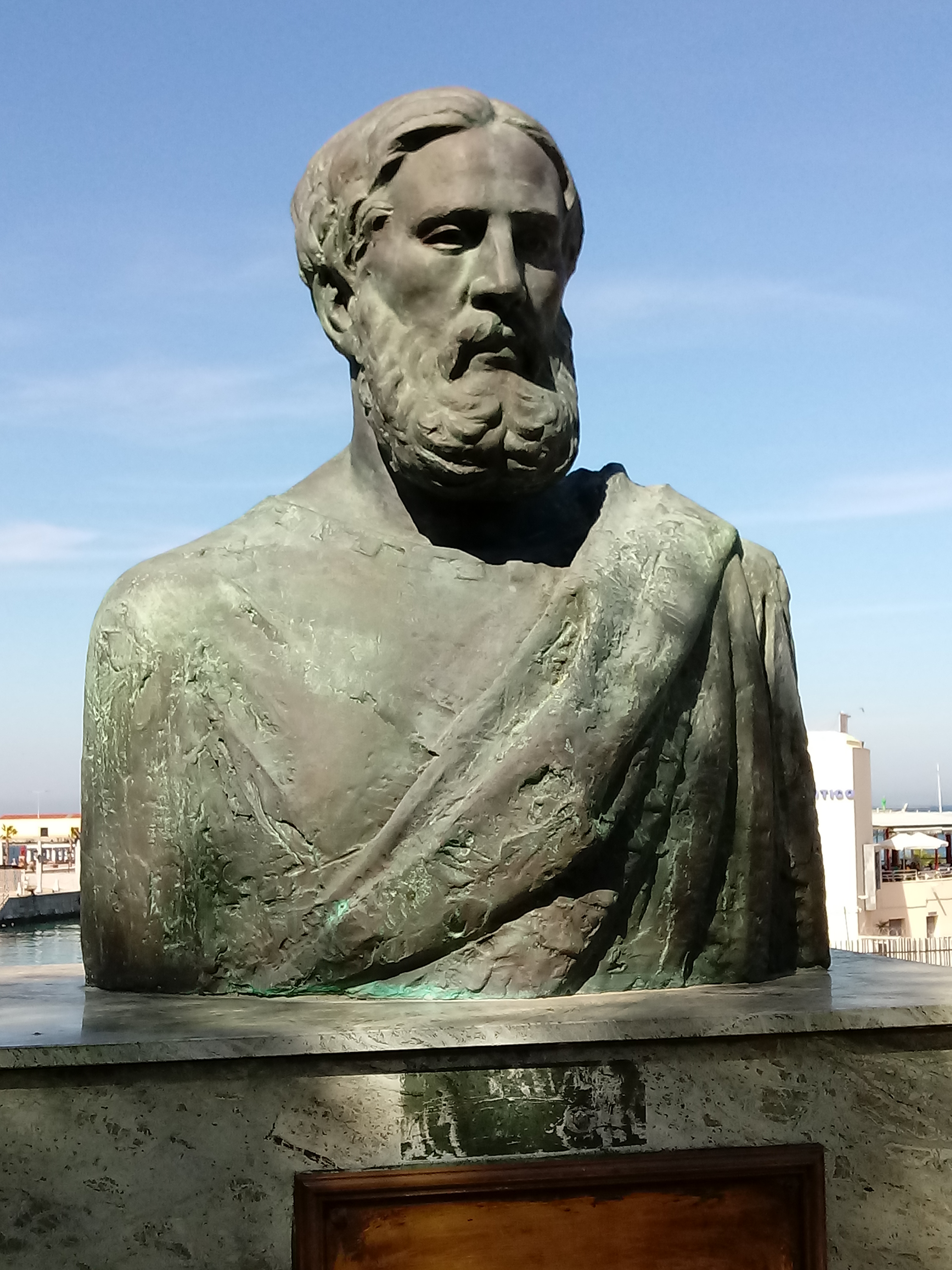 Busto del geógrafo griego Estrabón en la Calle Edrisi.